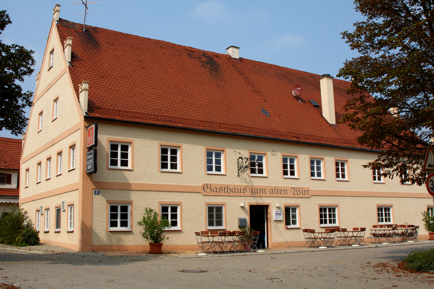 Gasthof zum Alten Wirt, mit Schwalbenschwanzzinnen, wohl 1. Hälfte 18. Jh., schmiedeeiserner Ausleger, Rokoko.This is a photograph of an architectural monument.